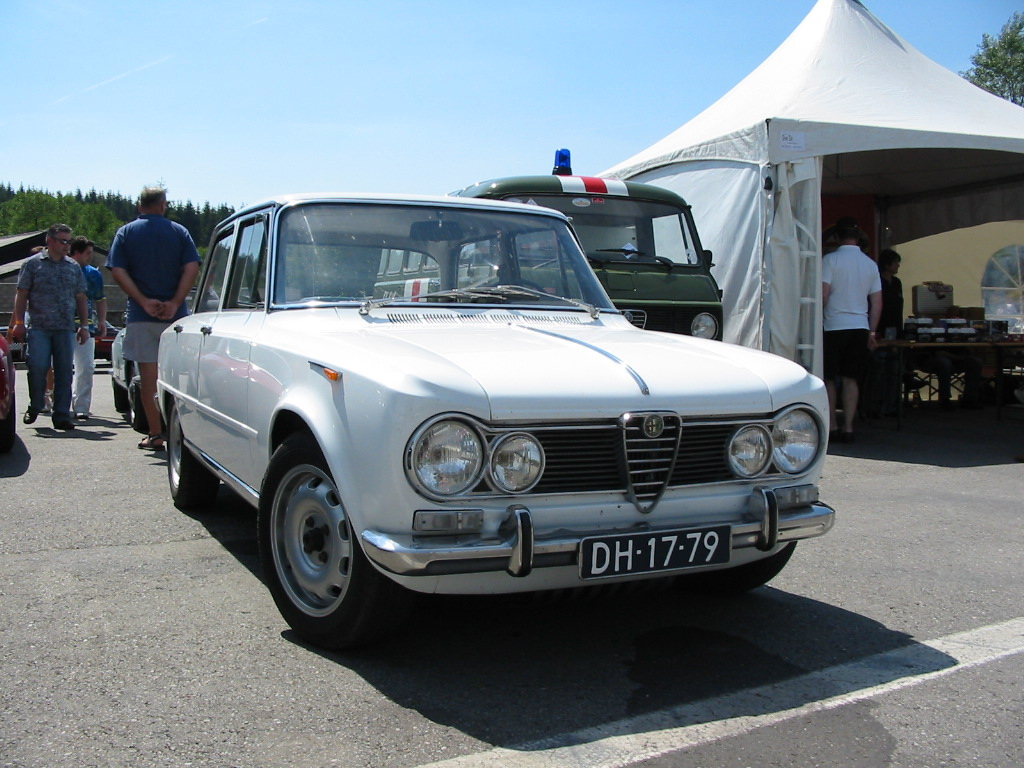 Alfa Romeo Giulia reg DH-17-79